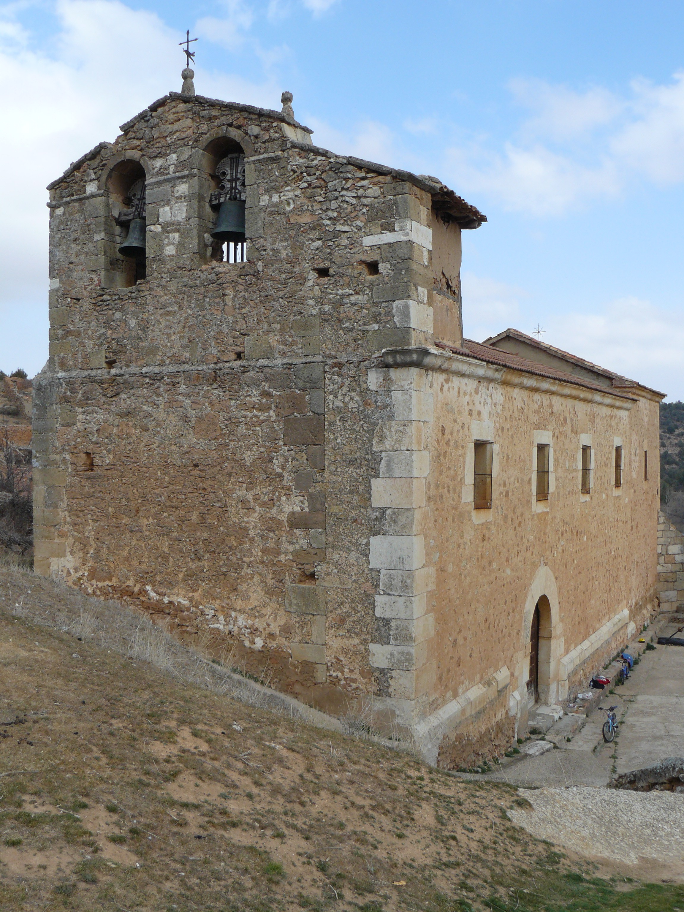 Carracosa de Abajo, Soria..